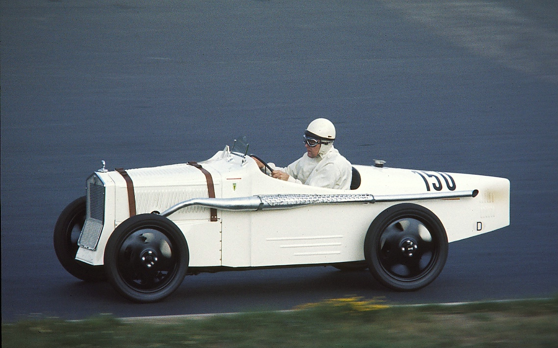 DKW F1, Baujahr 1932 (?) beim Oldtimer-Grand-Prix des AvD auf dem Nürburgring